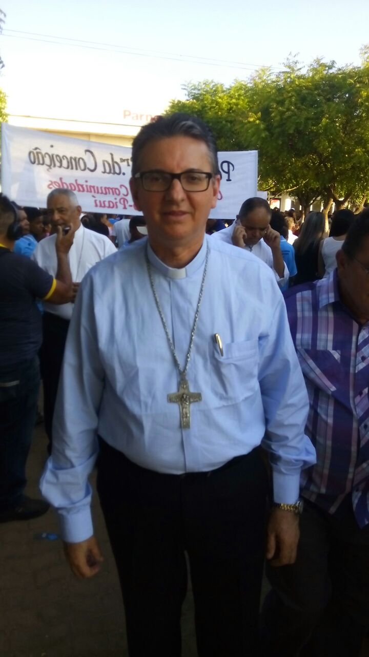 Bispo de Oeiras na posse de Dom de Francisco de Assis Gabriel dos Santos.